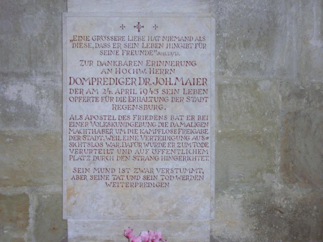 Grabstein des Domprediger Dr. Johann Maier im Dom zu Regensburg Eigentümer des Bildes: Andreas Binninger Fotograf des Bildes: Petronella Koning Fotografie: November 2006